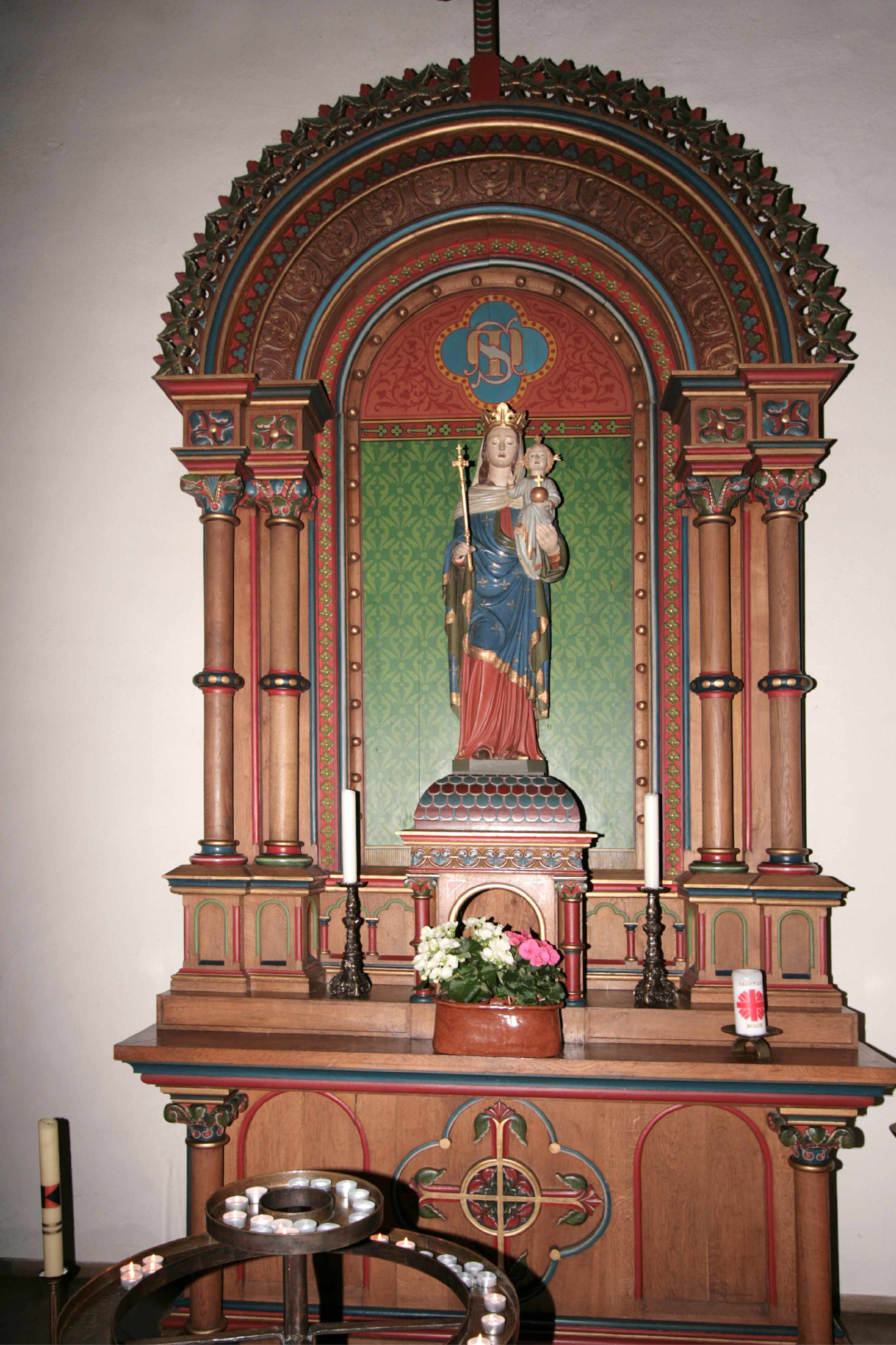 Beschreibung: Linke Seitenaltar Kirche St. Martin in Bigge Quelle: Eigenes Foto Urheber: Wolfgang Poguntke Aufnahmedatum : 13.07.2008